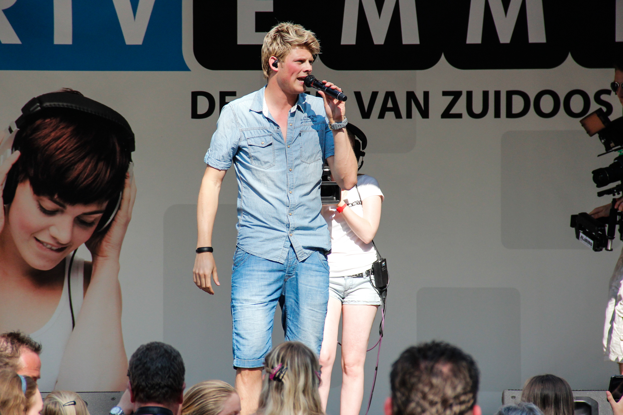 Tim Douwsma tijdens een optreden bij Alles Kids in Drenthe 2013